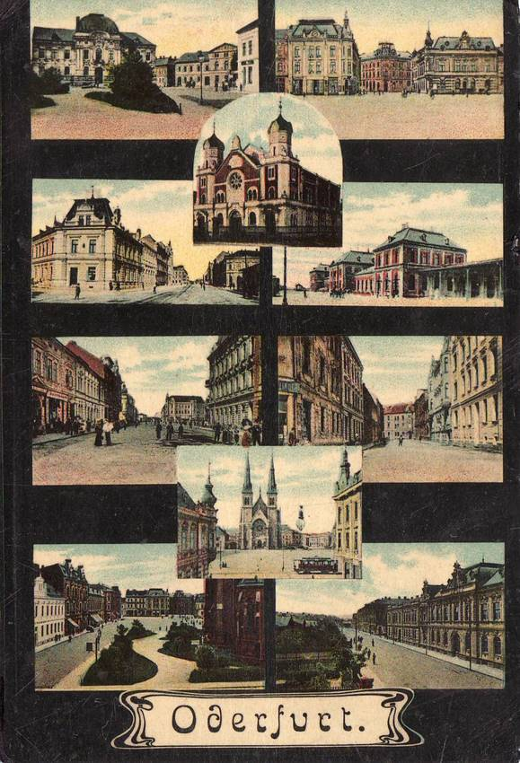 Přívoz, pohlednice před rokem 1918